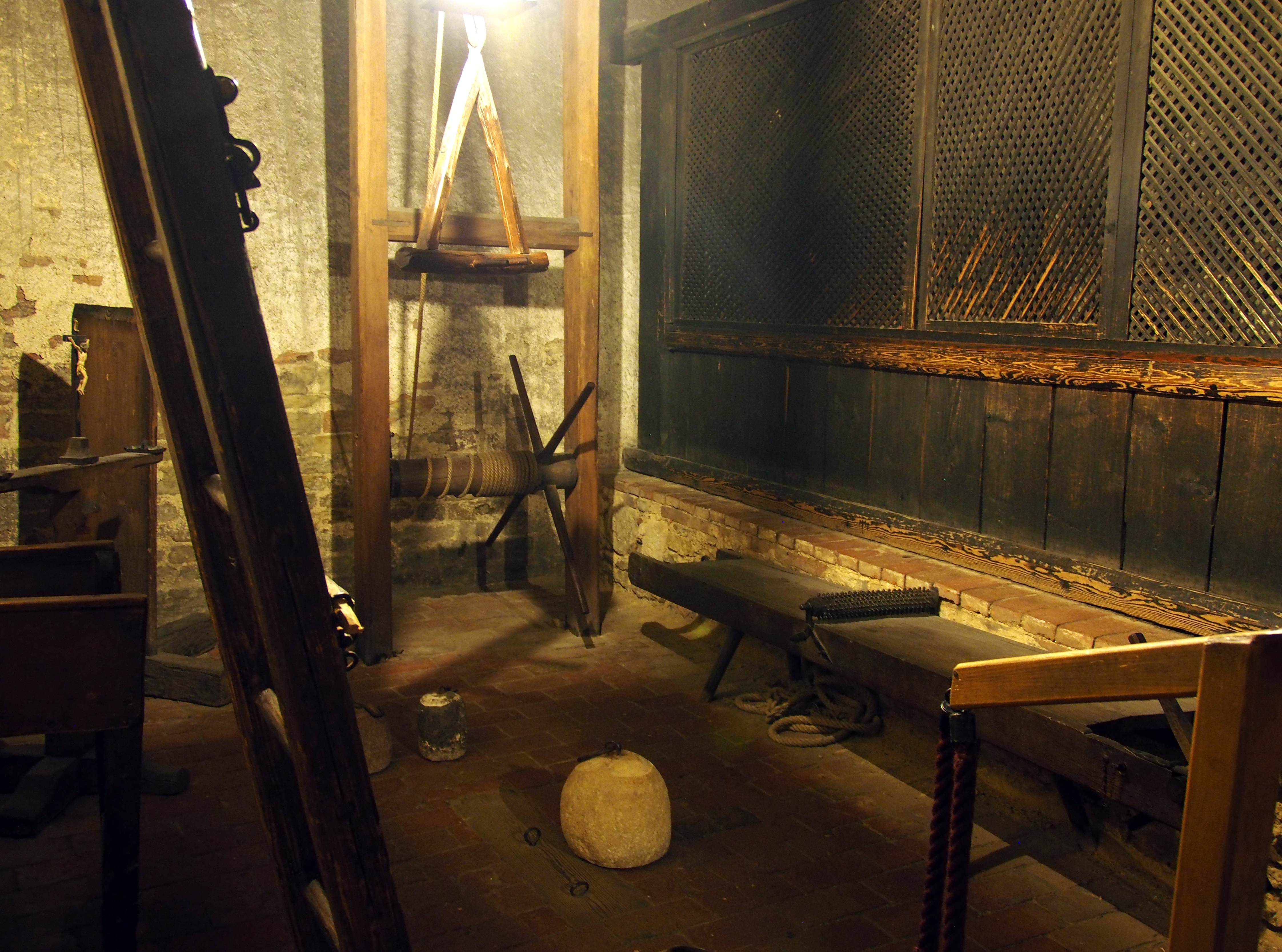 Fragstatt Folterinstrumente